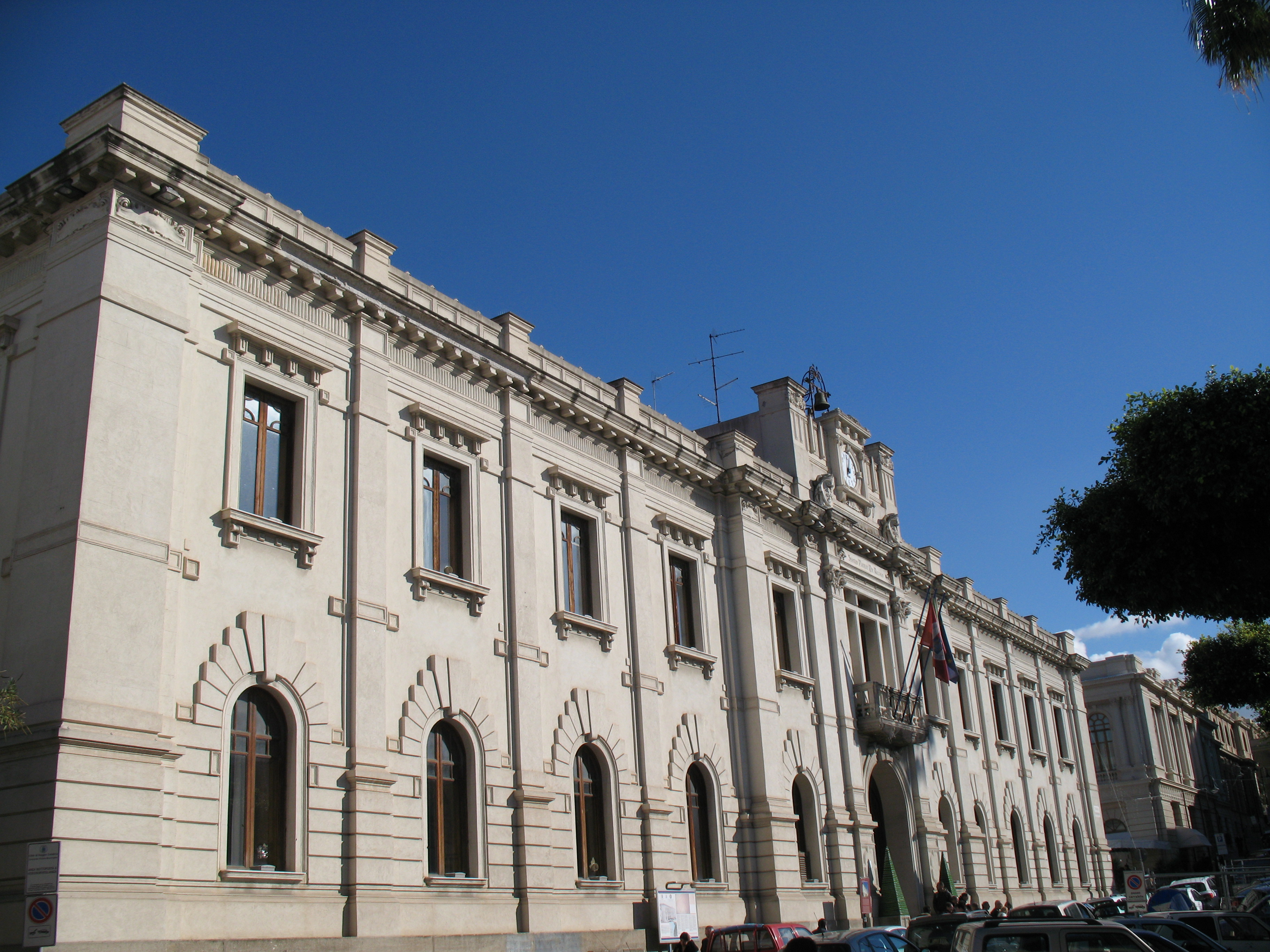 Palazzo San Giorgio, facciata ripresa dal lato sinistro. Reggio Calabria, Italia